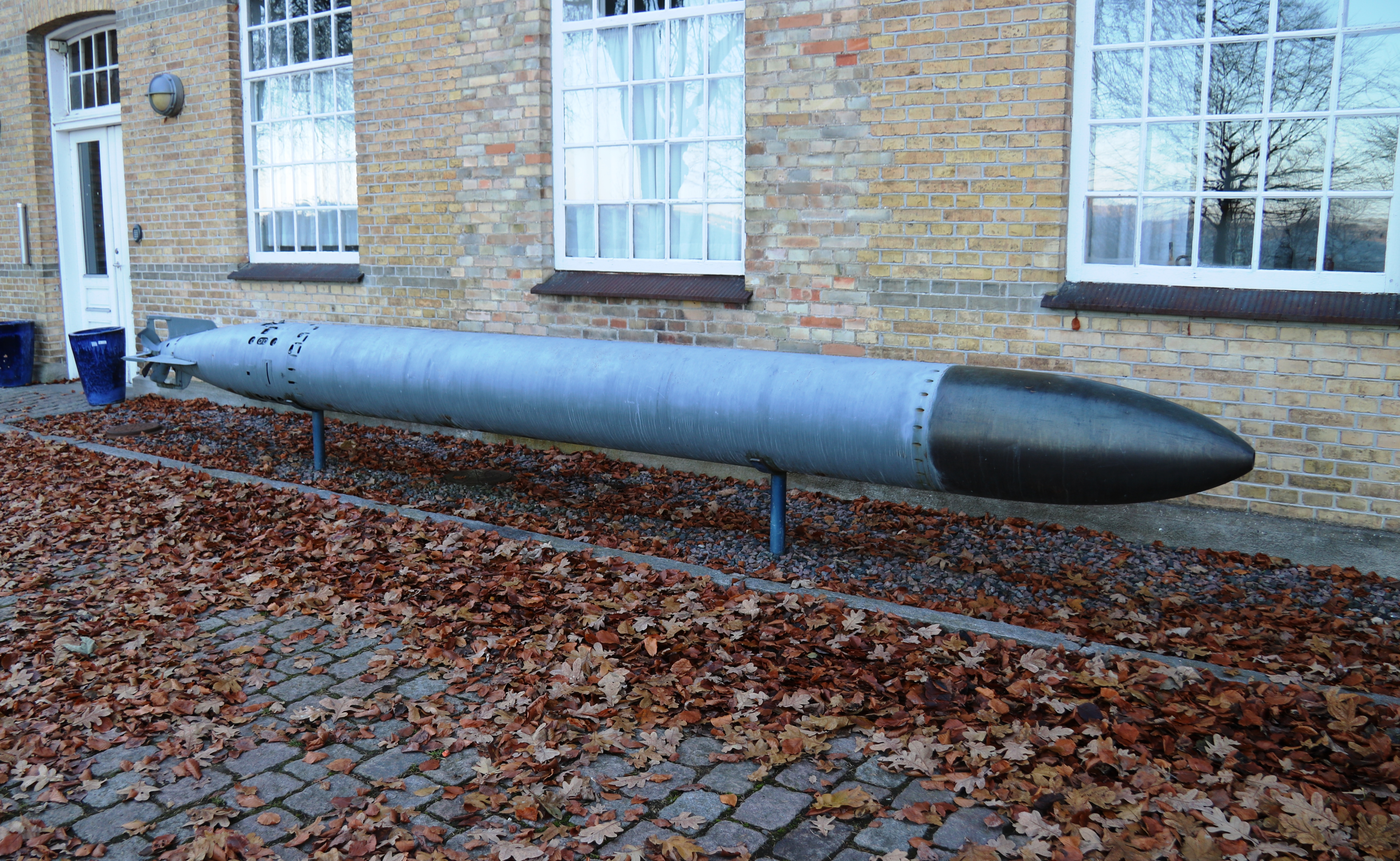 Aktiv torpedo udstillet ved Søminestationen, Holbæk, Denmark